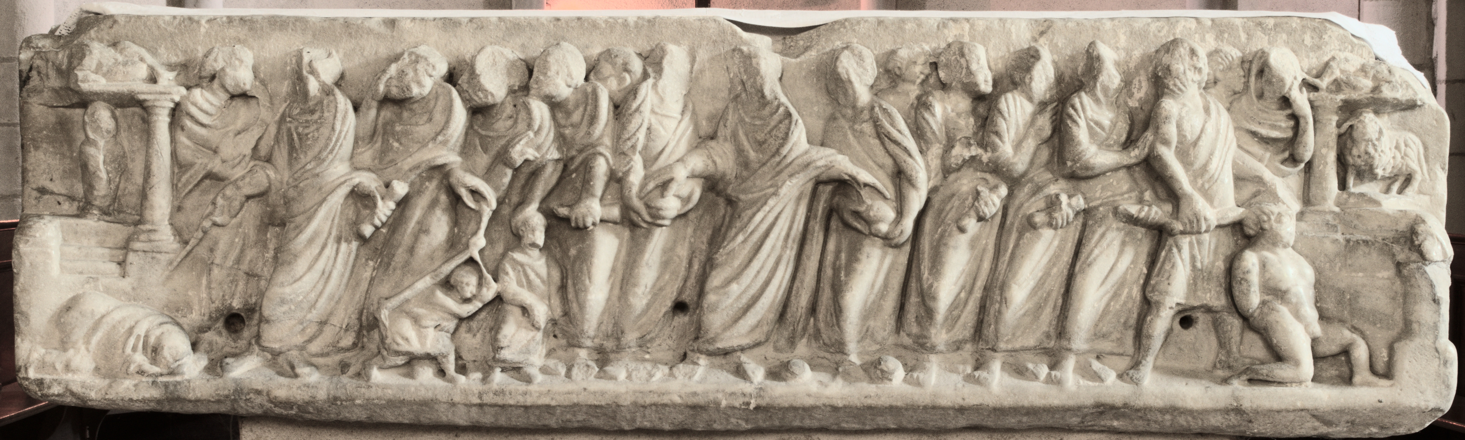 Sarcophage (IV-Ve Siècle), marbre blanc, église Saint-Vincent, Lucq de Béarn, Pyrénées-Atlantiques